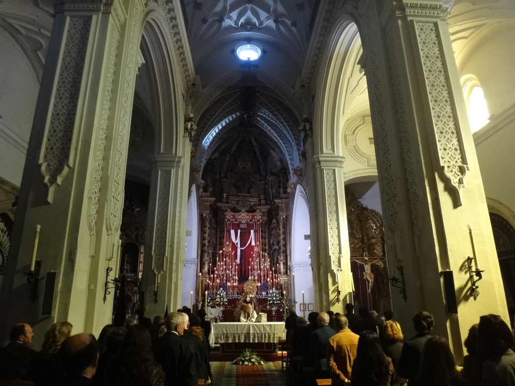 Iglesia de San Lucas , Jerez de la Frontera (Andalucía, España)